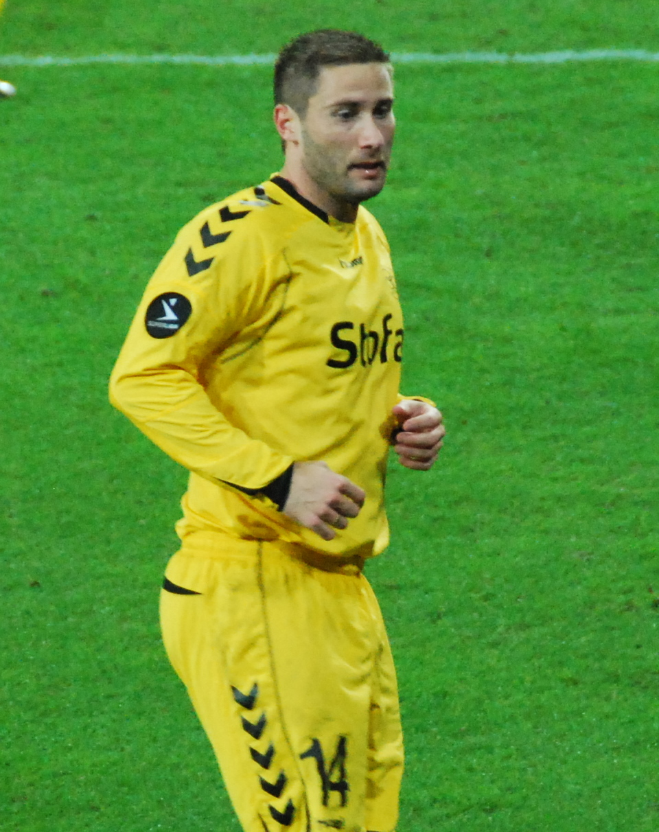 Fodboldspilleren Martin Retov fra AC Horsens. Her i en superligakamp mod FC Midtjylland på MCH Arena i Herning.